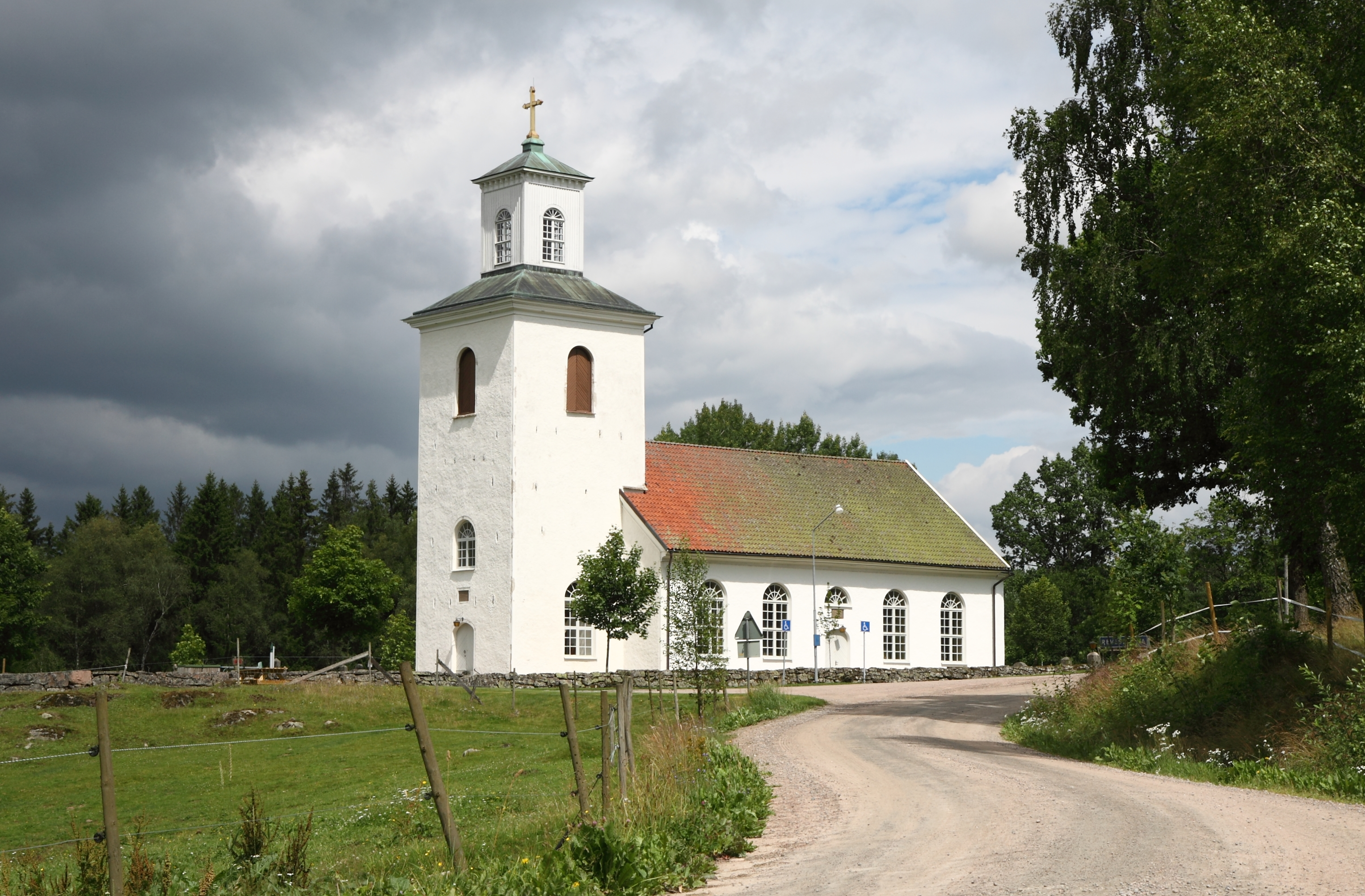 Revesjö kyrka.